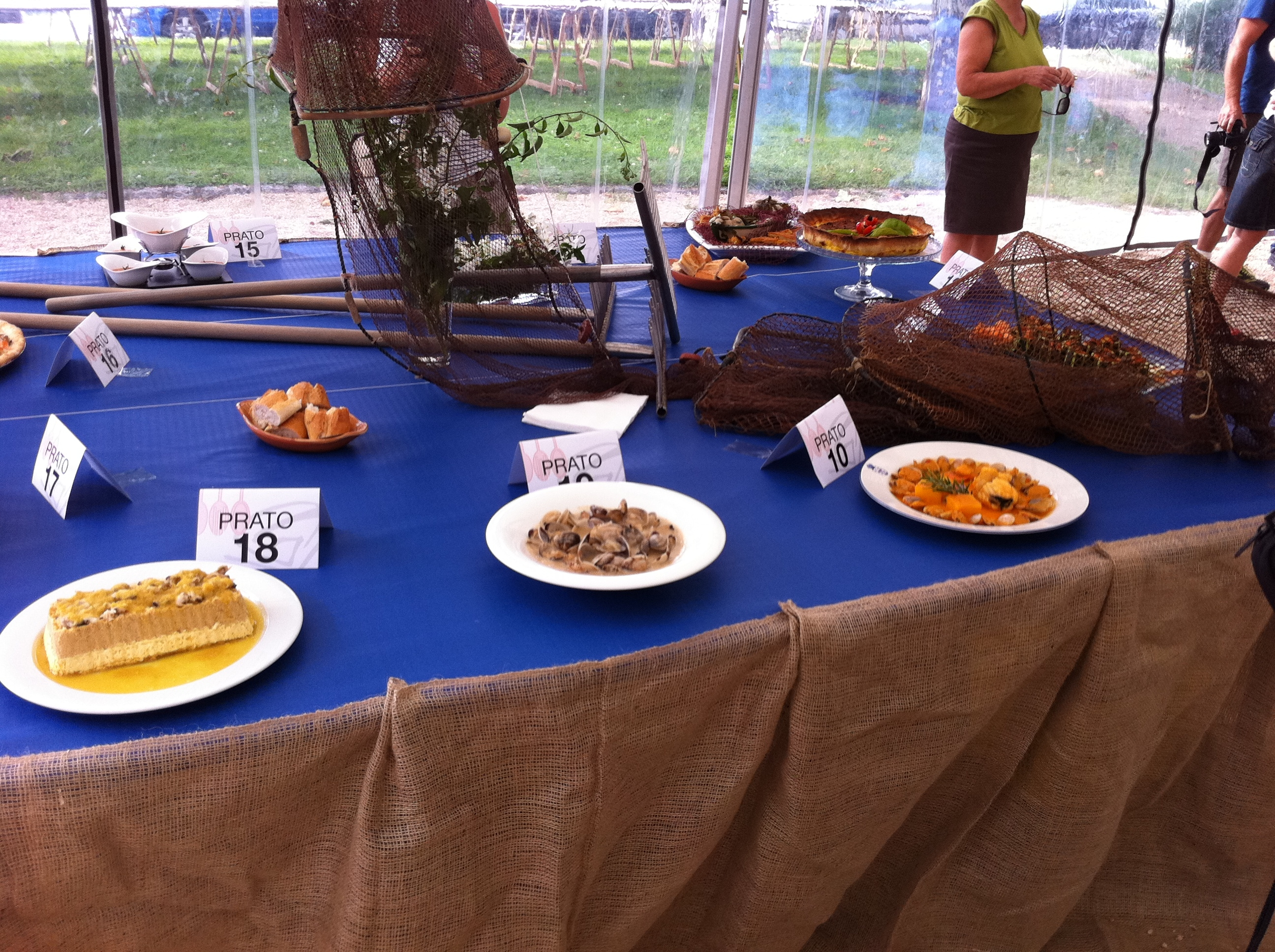 Concurso de platos elaborados con almejas de Carril.